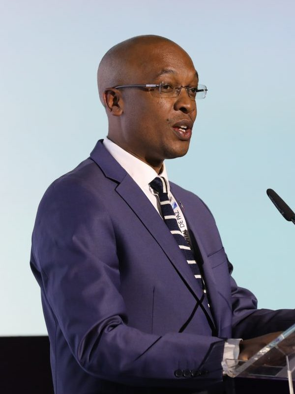 Música para abrir y cerrar la sesión inaugural del II Foro Mundial sobre las Violencias y Educación para la Convivencia y la Paz. Música sobre todo, como señaló la alcaldesa de Madrid Manuela Carmena, para recordar que, cuando se habla de violencia, se habla “del corazón humano”, del sentimiento que empuja a un ser humano a acometerla. Los acordes del piano de James Rhodes pusieron la nota inicial. También la final, pero esta vez con la interpretación de las orquestas infantiles de Acción Social por la Música, Da la Nota, Pequeñas Huellas y Notas de Paz, formaciones todas que utilizan la música como instrumento efectivo de inclusión social.